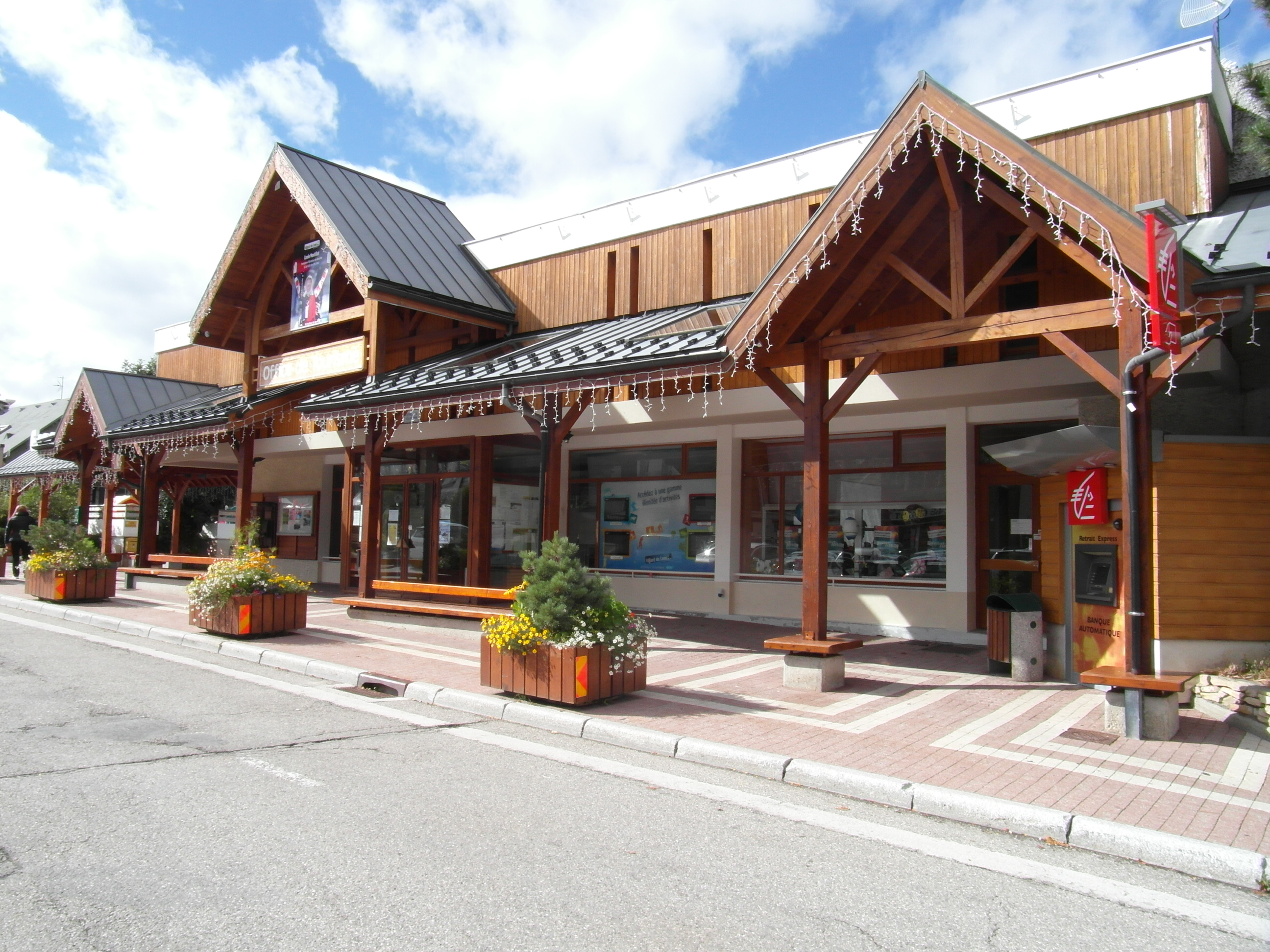 office de tourisme de Villard-de-Lans